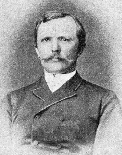 German archeologist Wilhelm Dörpfeld